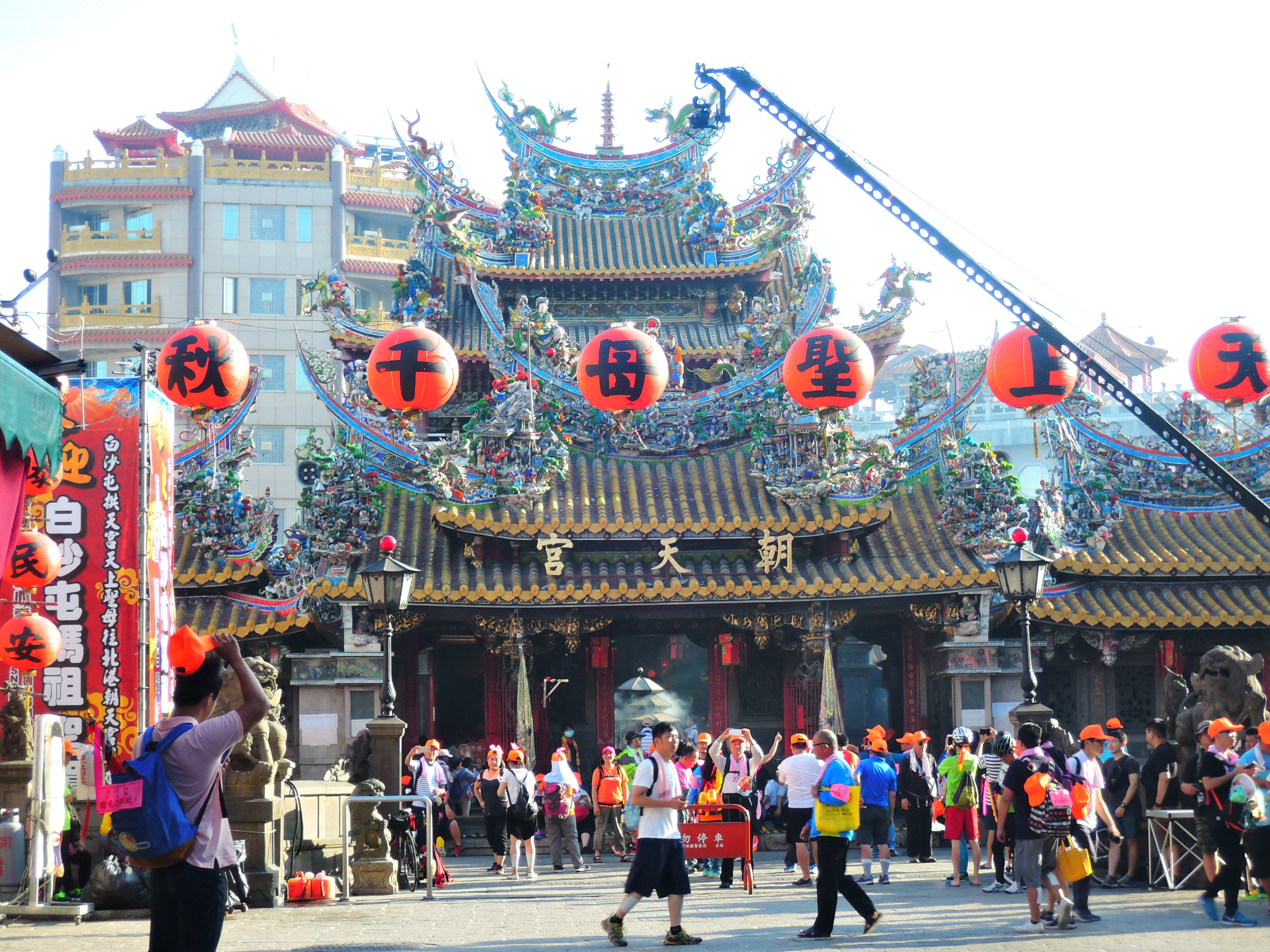 5月18日，恭迎白沙屯媽祖聖駕